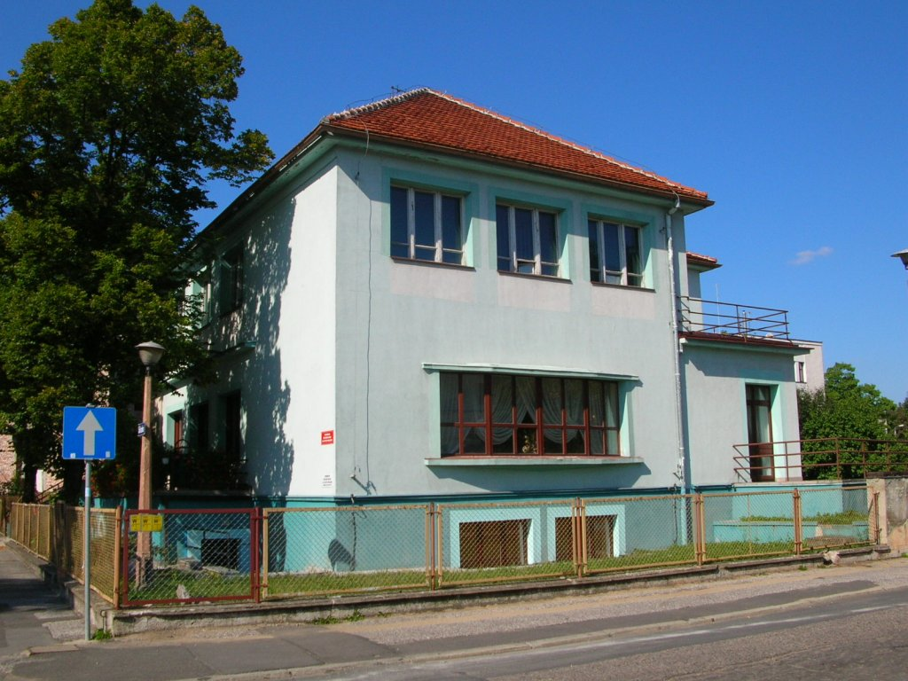 Willa przy ul. Sielanka 8a w Bydgoszczy